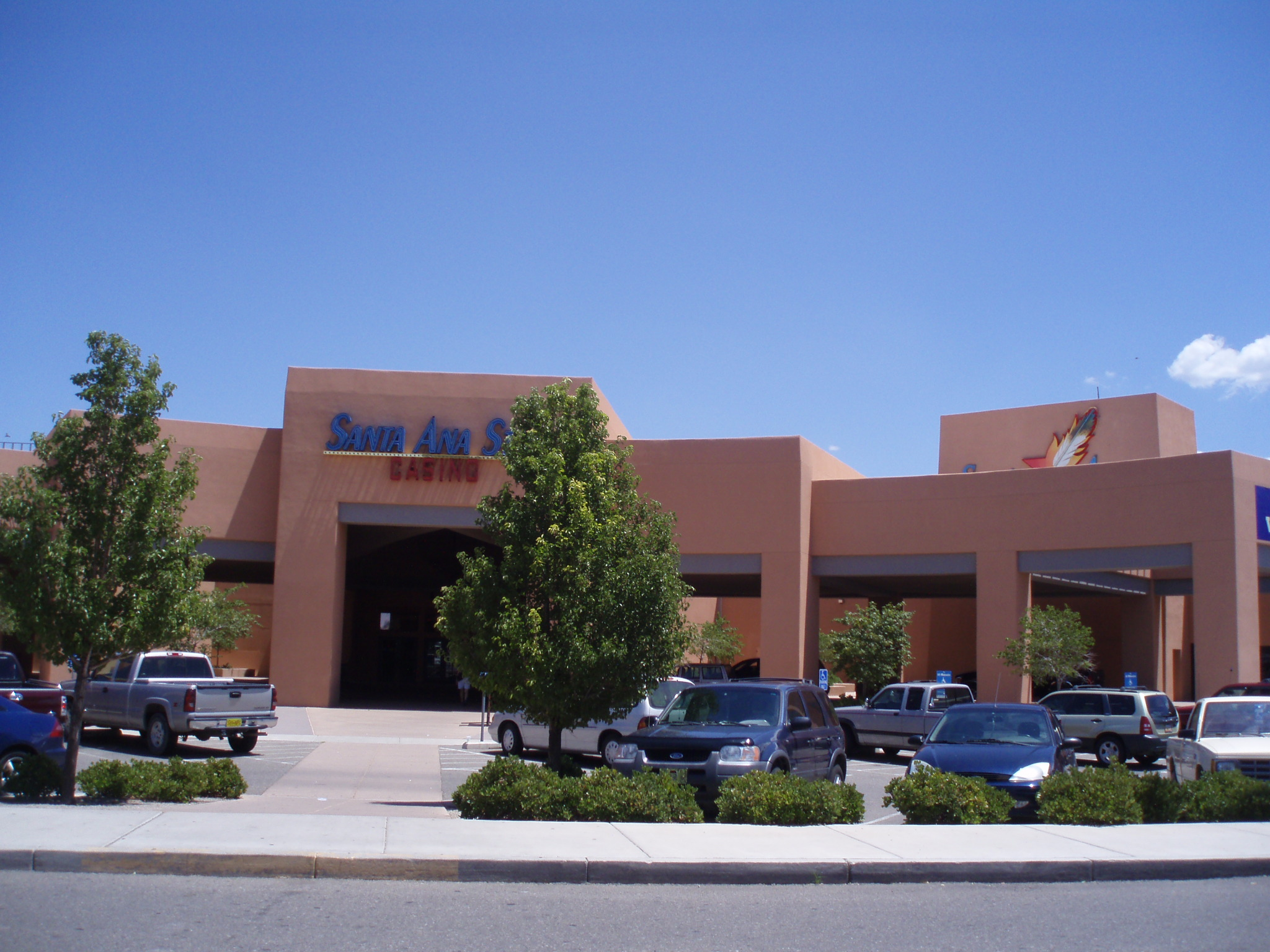 Santa Ana Casino, Santa Ana Pueblo, New Mexico